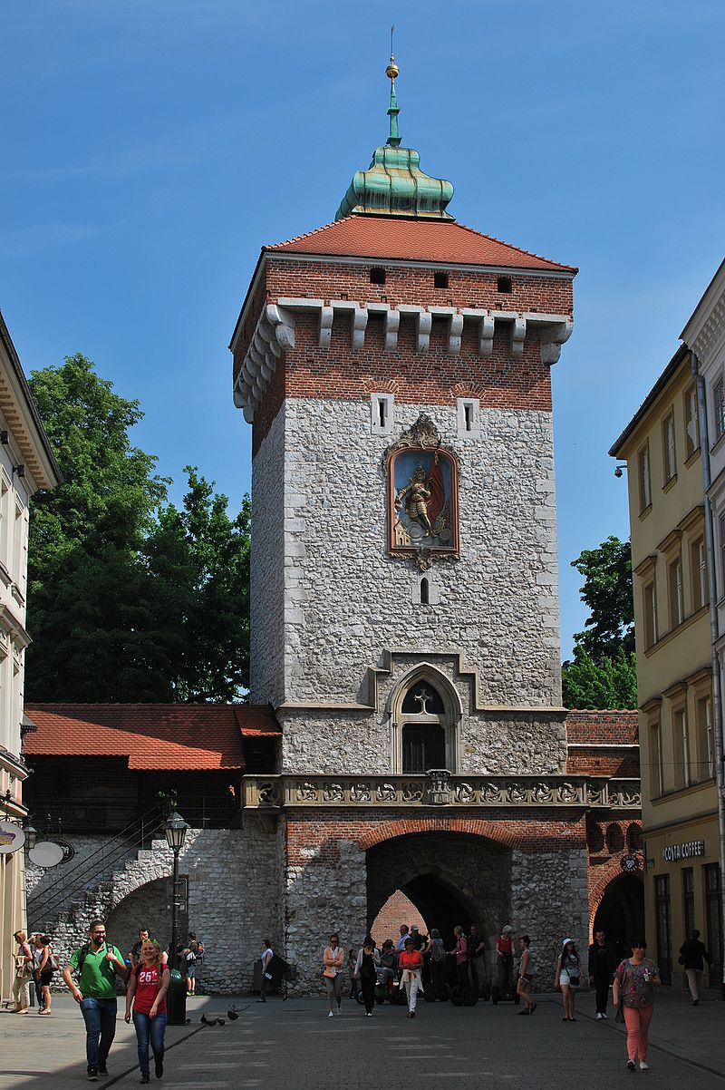 зроблено в польщі